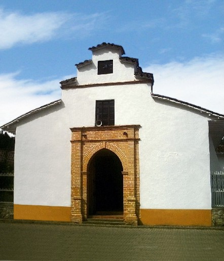 Capilla de Santa Ana, Guarne, Antioquia. Colombia